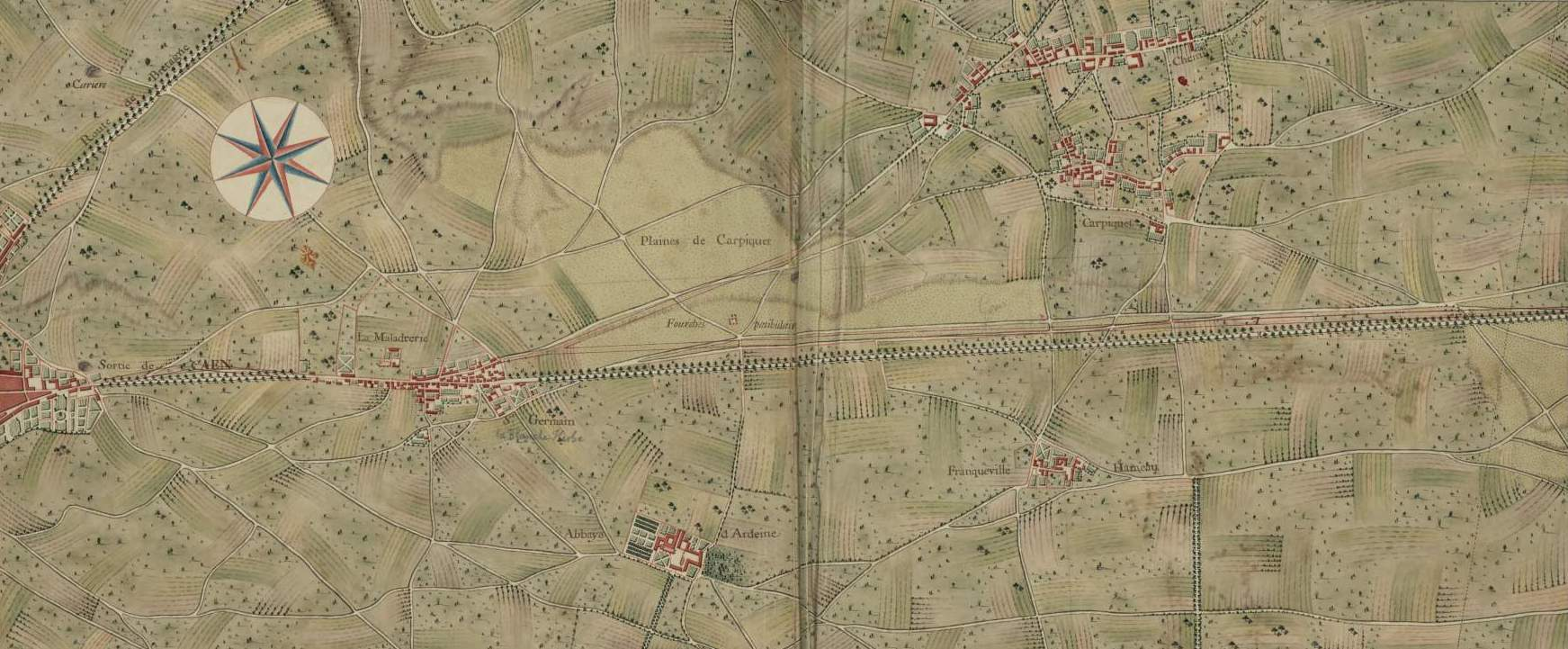 Carte de la route de Caen à Bayeux pour Isigny, Carentan, Sainte-Mère-Eglise, Montebourg, Valognes et Cherbourg. Portion de route à partir de Caen avec fourche vers Carpiquet en sortie de Saint-Germain-la-Blanche-Herbe